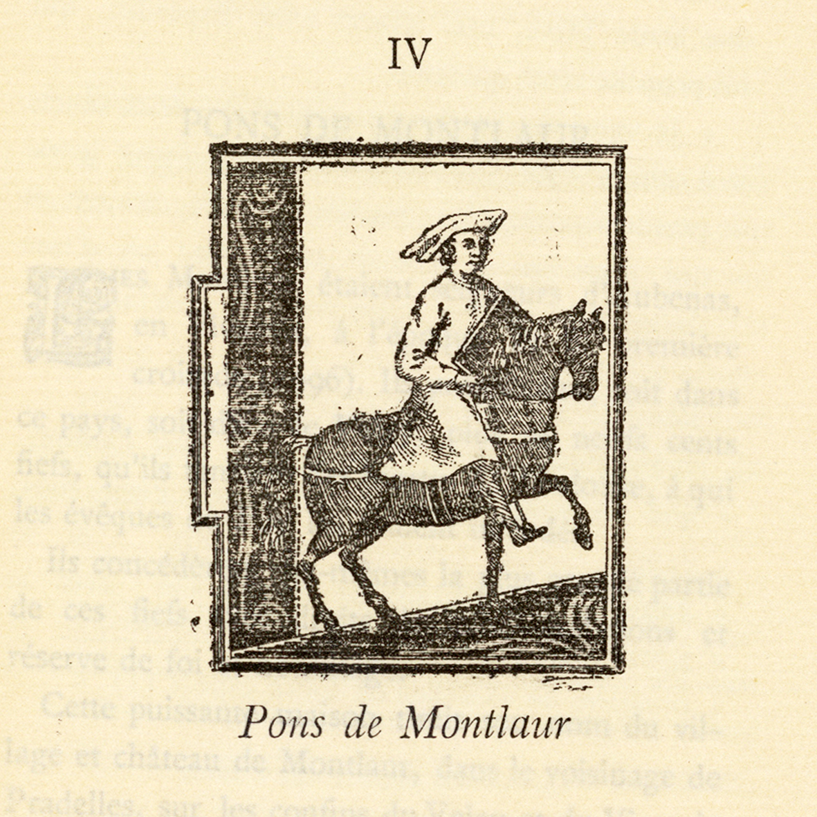 "Pons de Montlaur", còpia en gravadura d'una letrina istoriada representant Pons de Montlaur, troubadour du XIIIe siècle